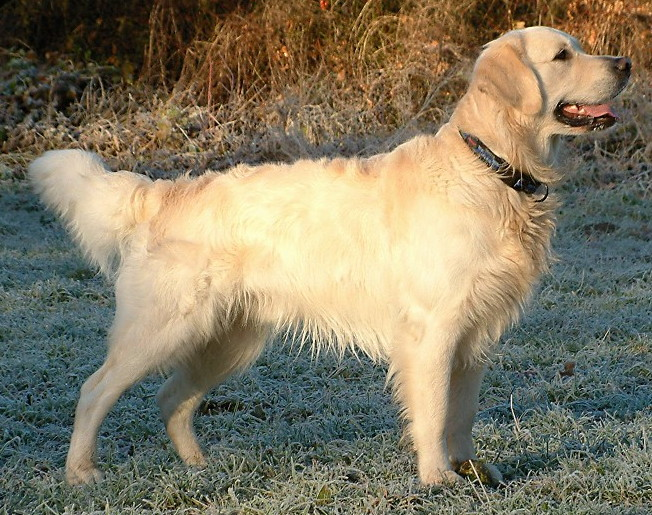 "Dukedestiny01.jpg